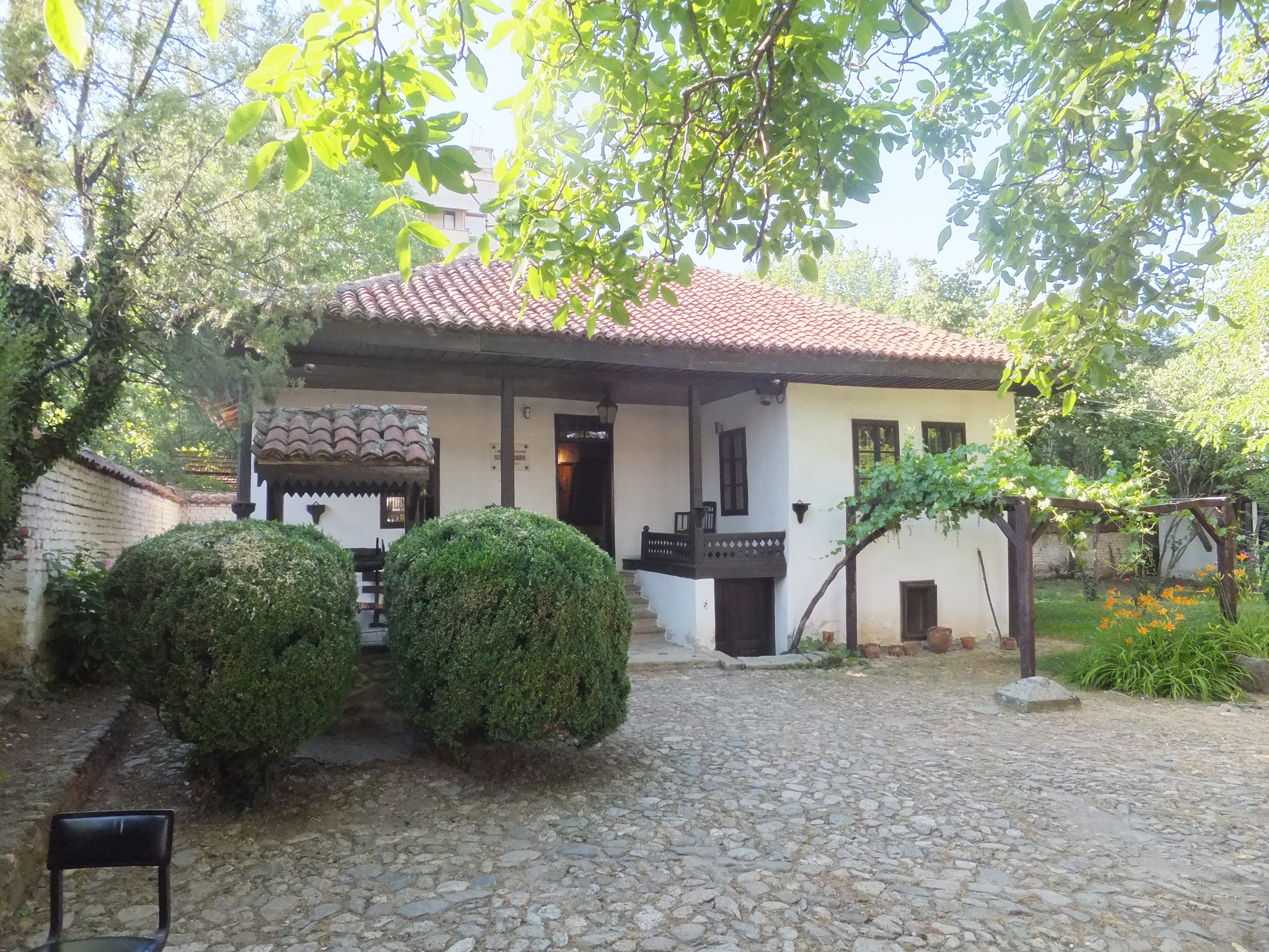 Кућа Борислава Станковића